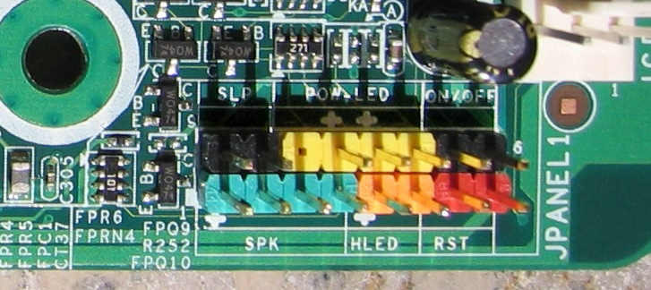 Front-Panel-Anschlüsse einer Computer-Hauptplatine